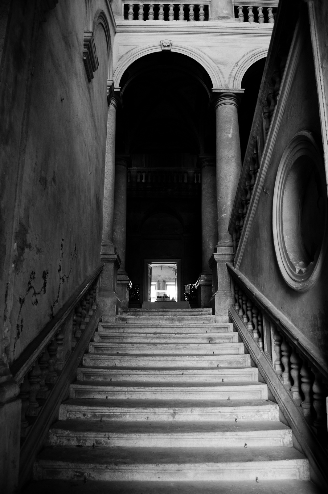 Schossberger-kastély (Tura, Kossuth u.)